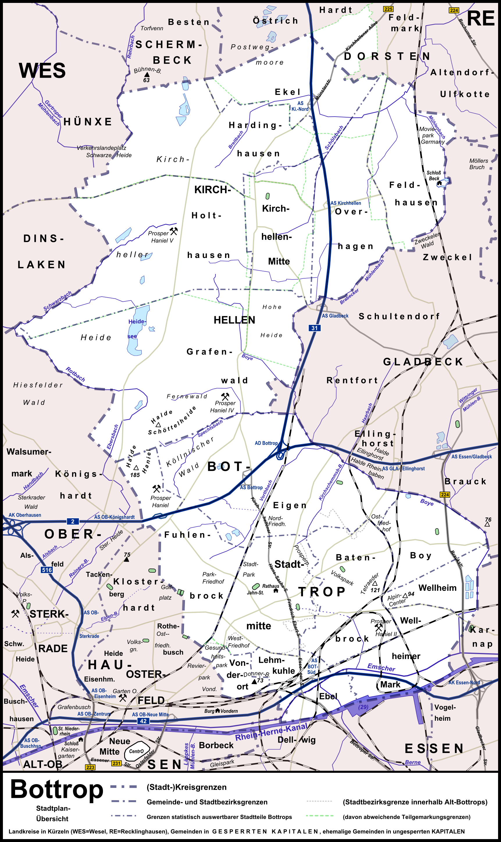 Stadtplanübersicht Bottrops